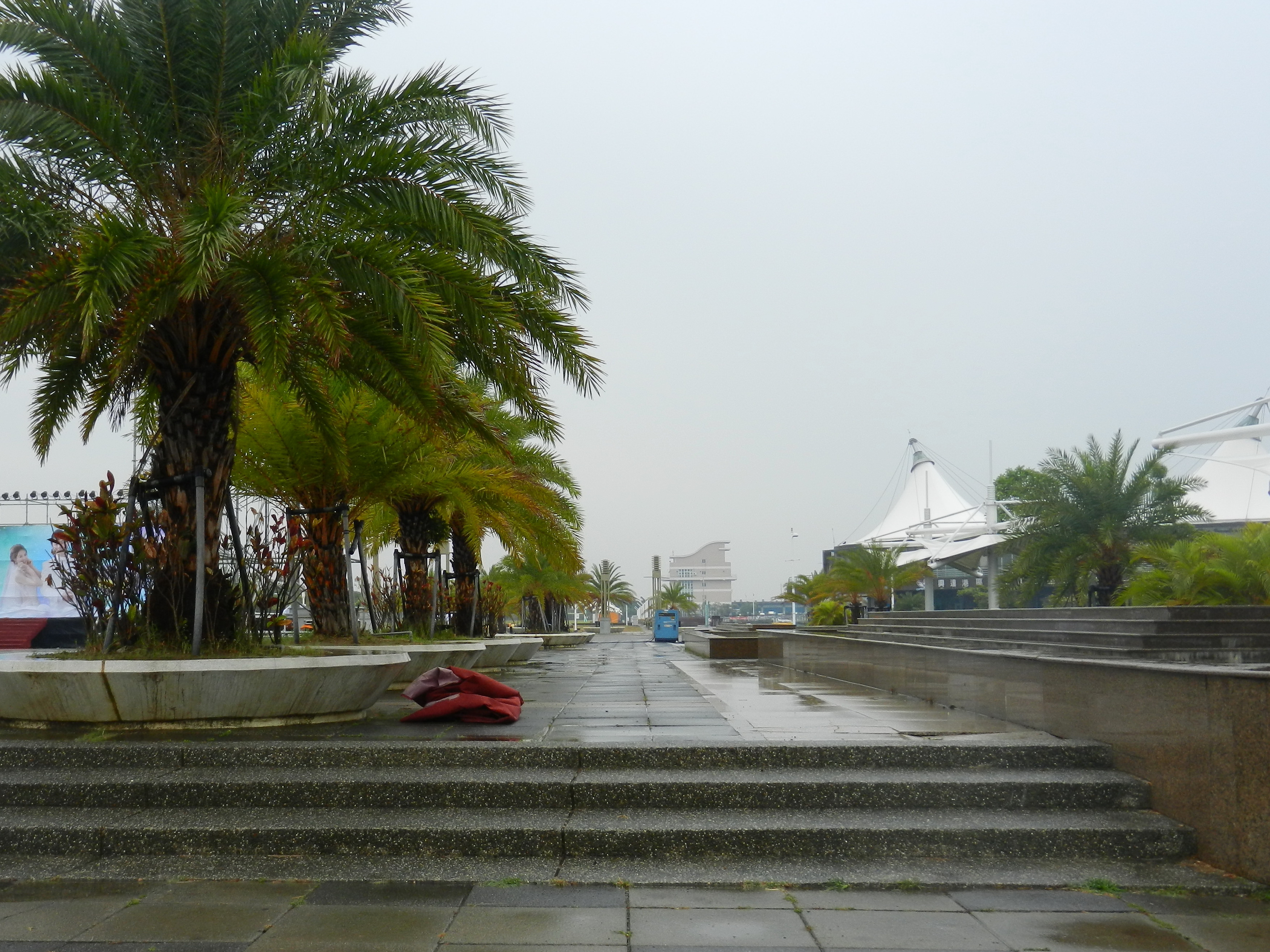 Qieding Lovers Pier 茄萣情人碼頭